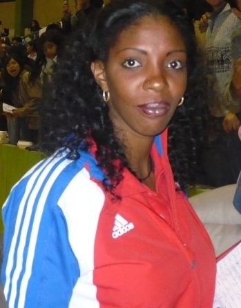 Regla Torres en Lima-Peru como asistente de Cuba, ya retirada de las Canchas de Voley